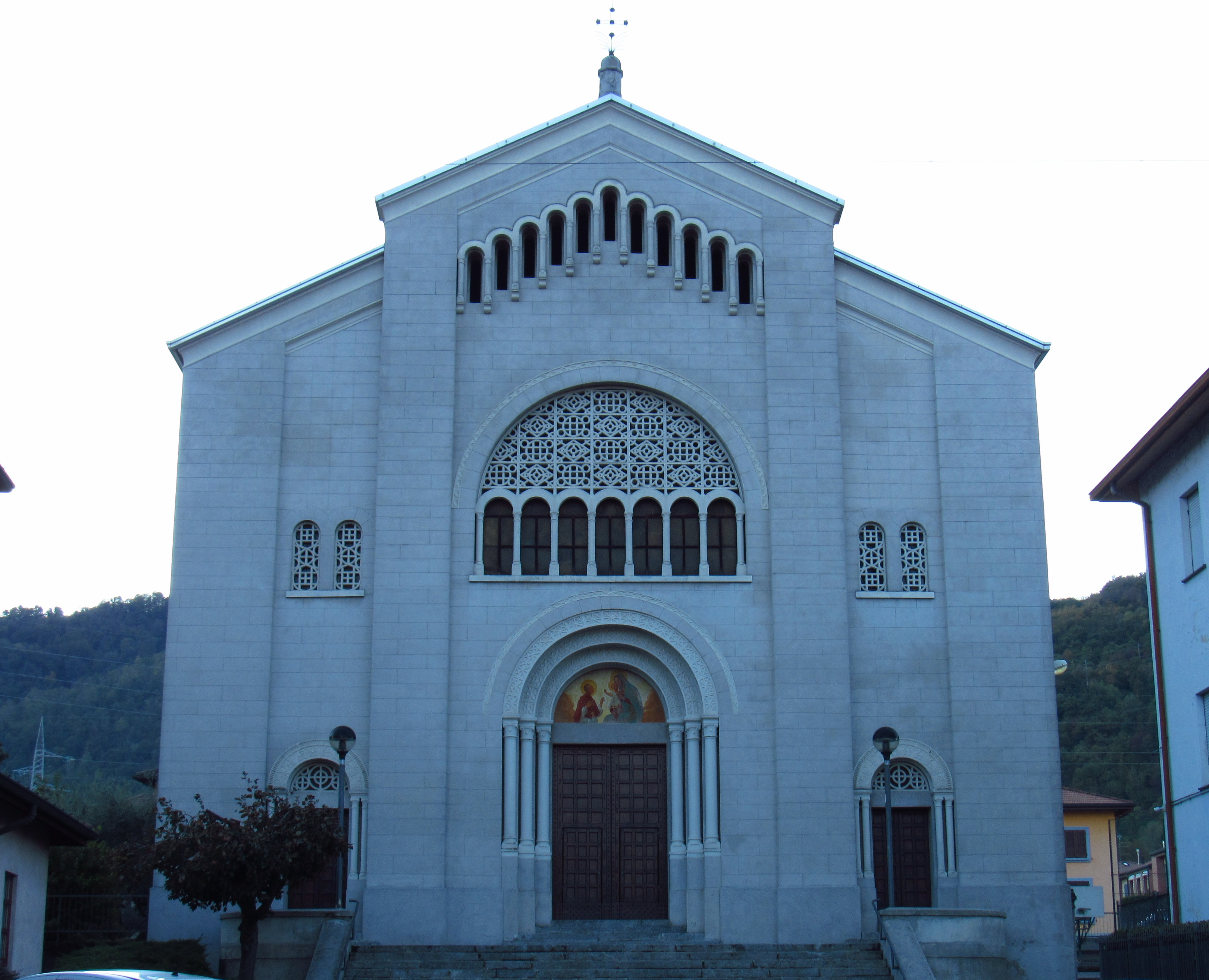 Chiesa parrocchiale di Villa San Carlo, comune di Valgreghentino, provincia di Lecco, Lombardia, Italia